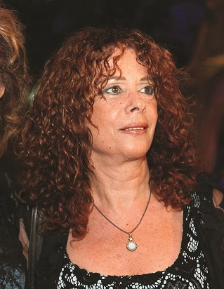 תמונתה של פרופסור רינה בן-שחר-מחנכת וסופרת ילדים